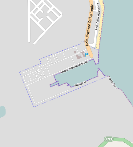 Plano del puerto Caleta Paula